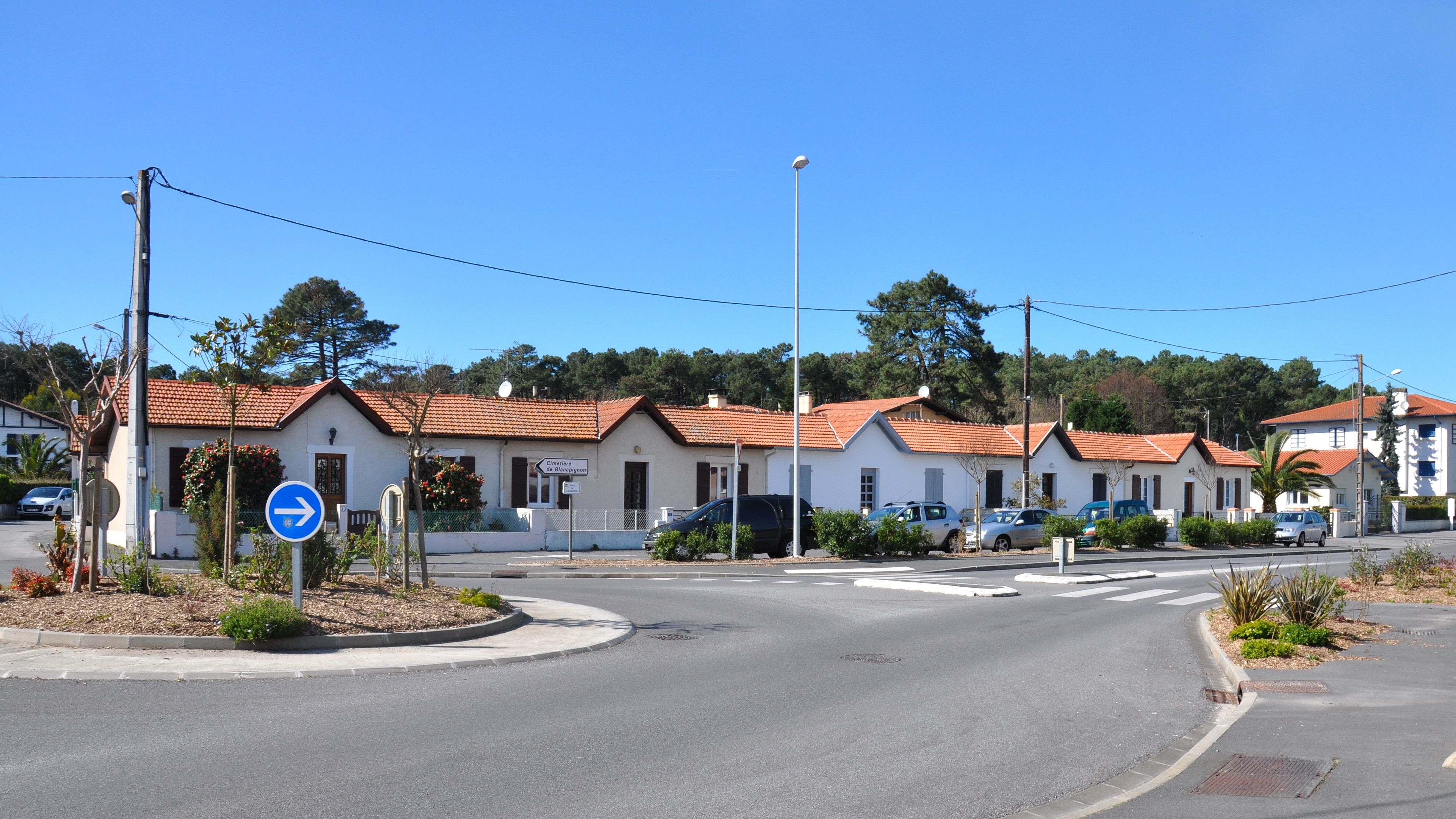 Quartier Blanc-pignon ANGLET - architecture ouvrière